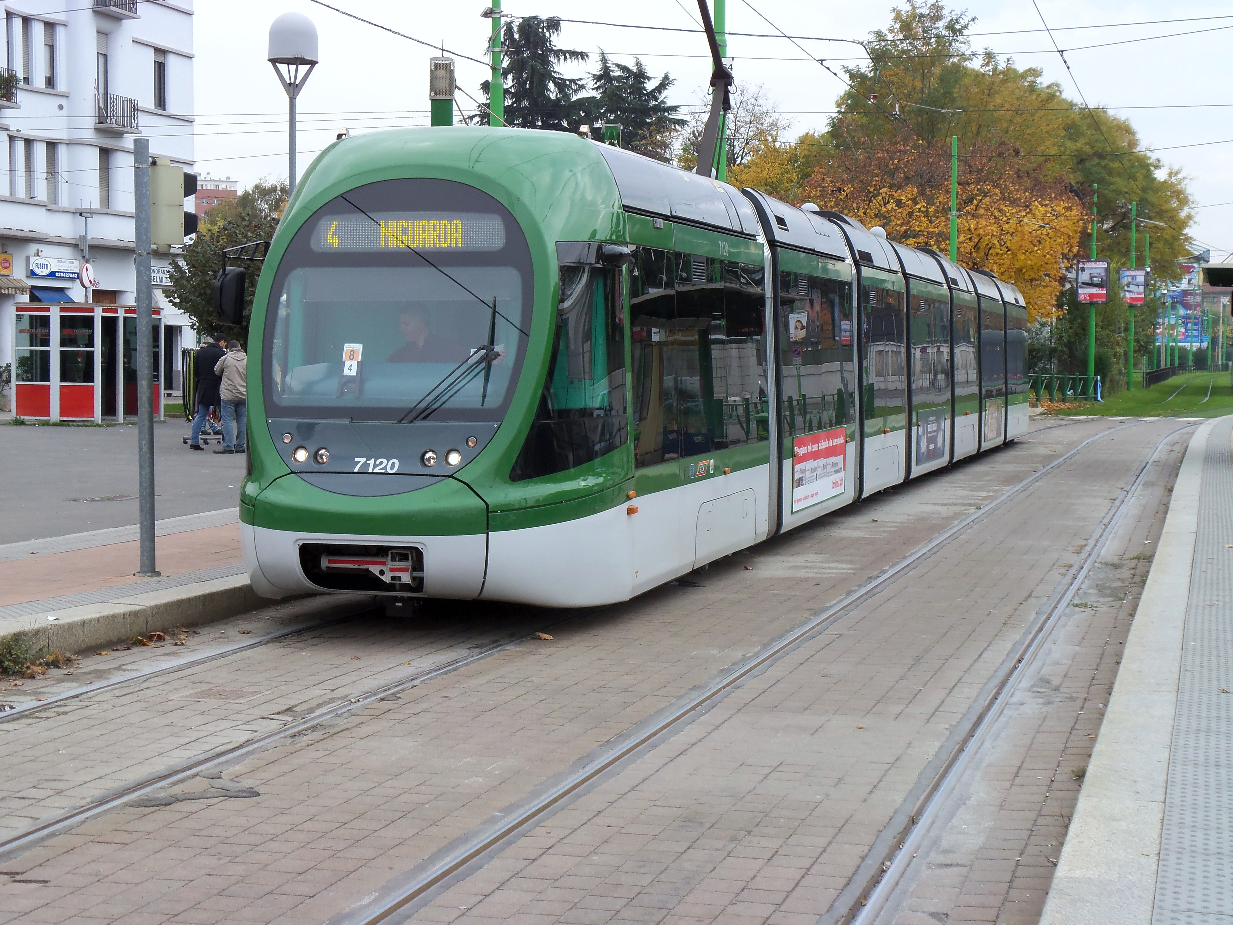 Tram di Milano in sosta in piazza dell'Ospedale Maggiore.